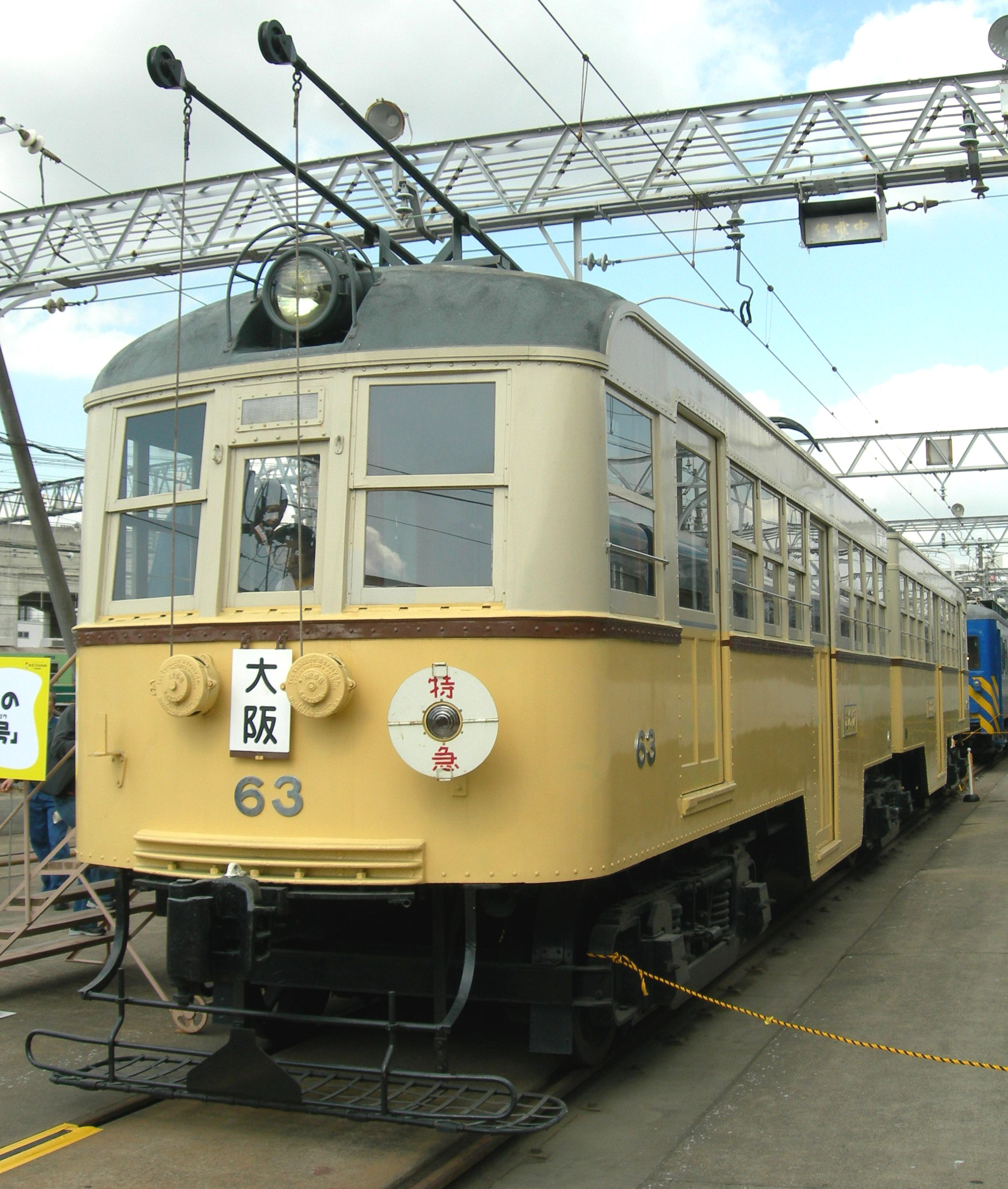 京阪60形電車